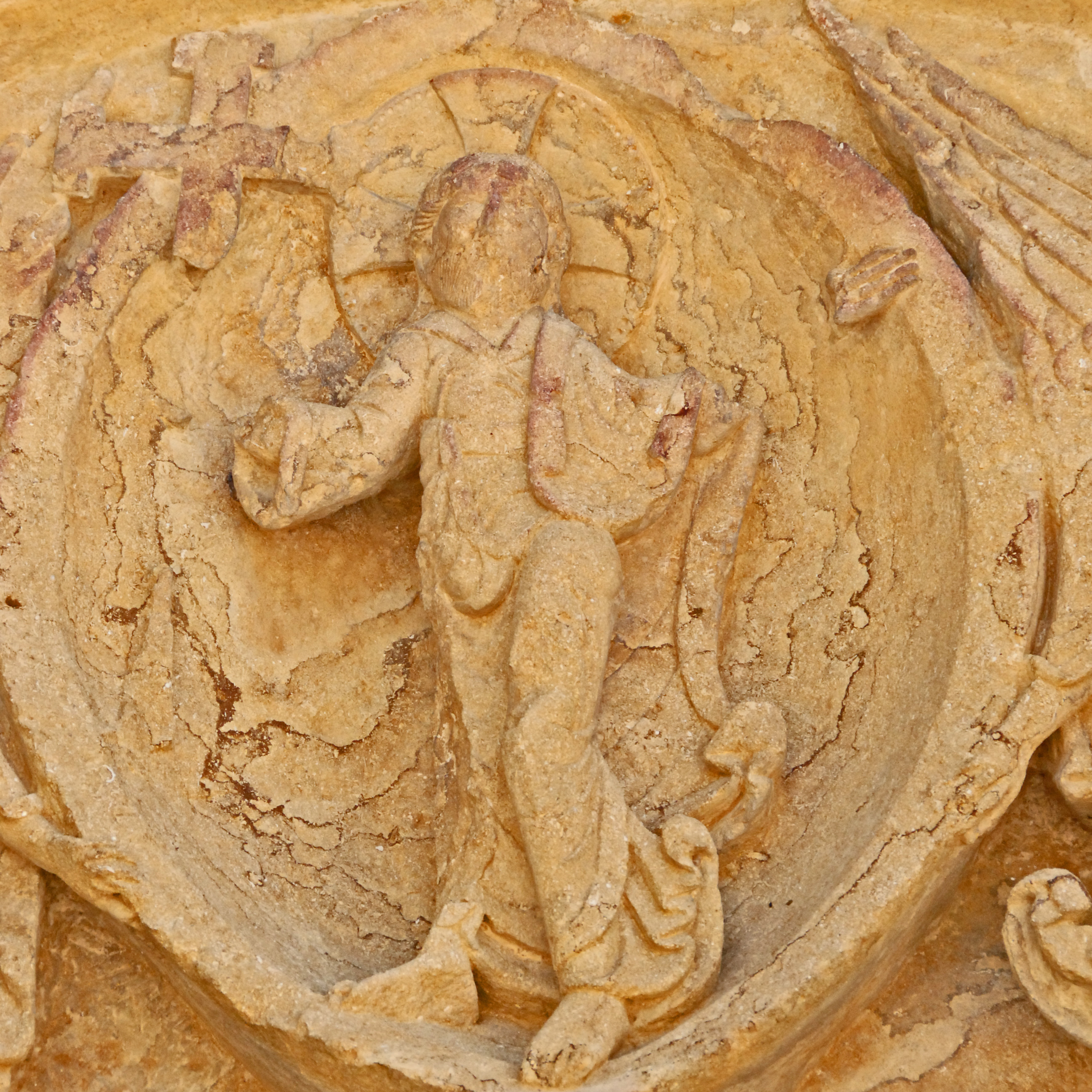 Sts-Pierre-et-Paul de Montceaux-l'Étoile, Christus in Mandorla